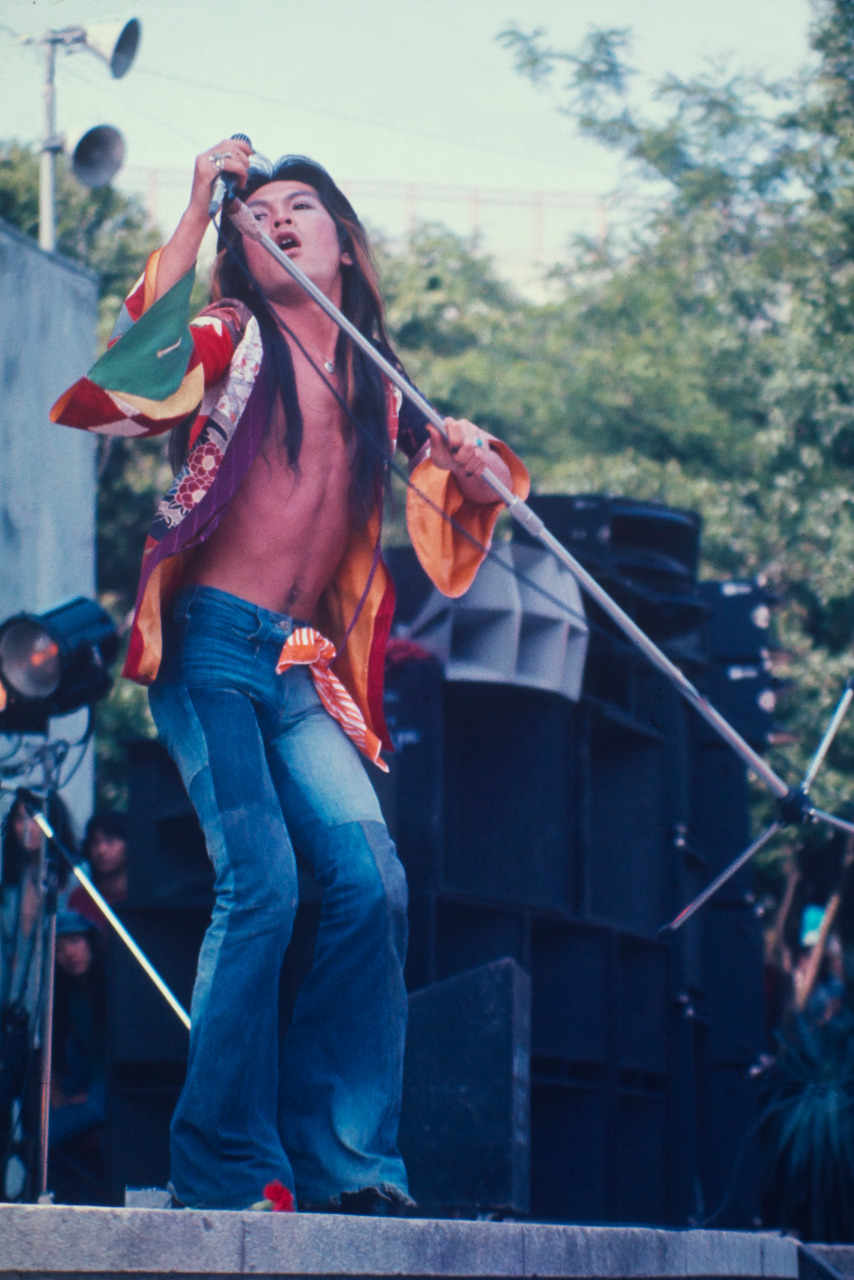 ライブステージにて